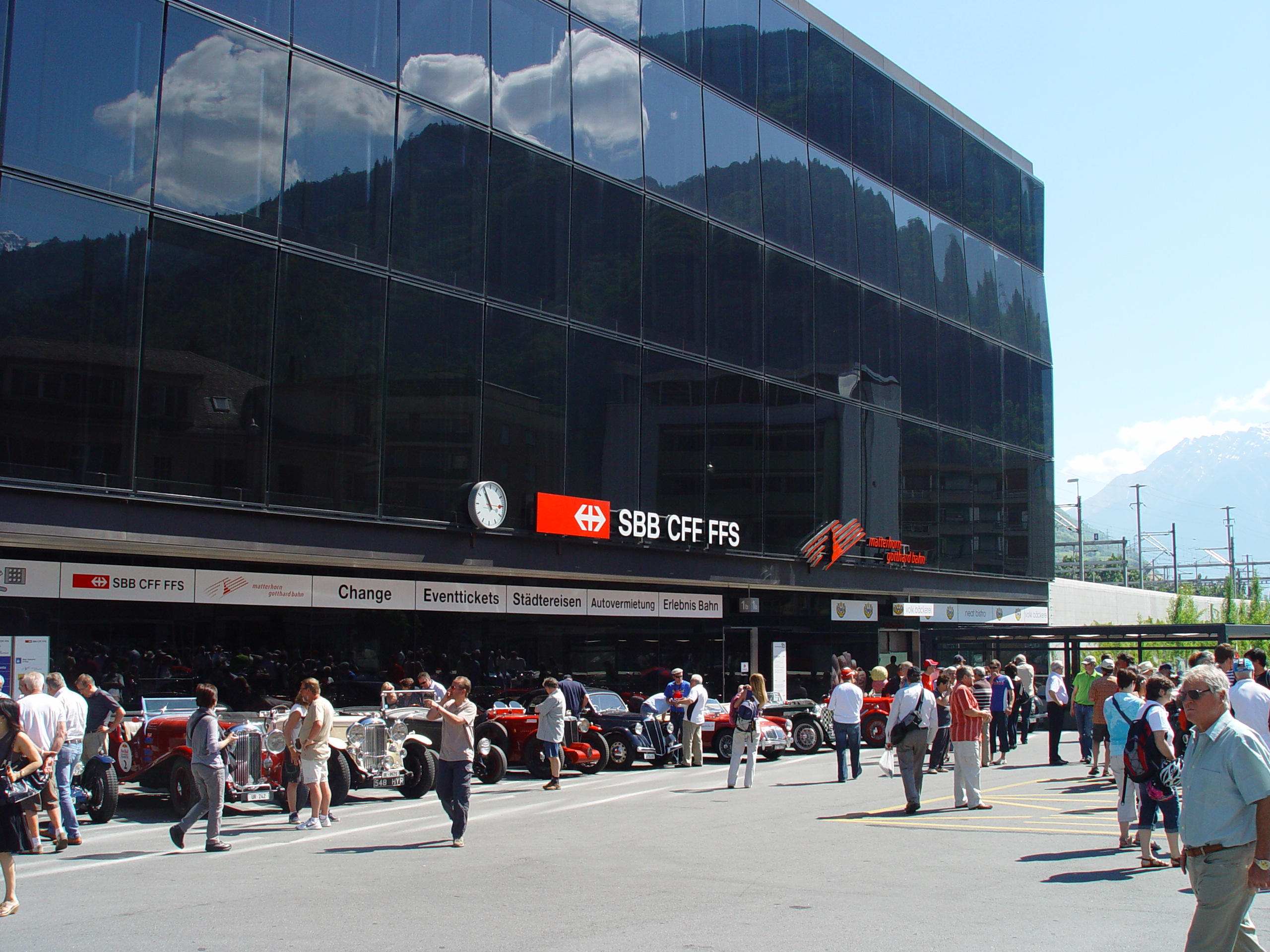 Bâtiment voyageurs de la gare de Visp.